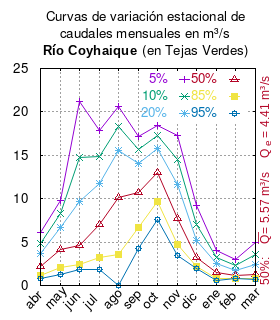 Curvas de variación estacional del río Coyhaique en Tejas Verdes. # Dirección General de Aguas # Diagnóstico y clasificación de los cursos y cuerpos de agua según objetivos de calidad. Cuenca del río Aysén. # Santiago de Chile # Ministerio de Obras Públicas (Chile) # 2004 # url: # urlarchivo: # Tabla 4.8: Estación Coyhaique en Tejas Verdes, pág. 56 mes 5% 10% 20% 50% 85% 95% abr 6.09 4.87 3.72 2.21 1.17 0.80 may 9.75 8.25 6.64 4.16 2.08 1.28 jun 21.20 14.74 9.65 4.66 2.39 1.86 jul 17.84 14.88 11.75 7.01 3.21 1.84 ago 20.67 18.34 15.53 10.14 3.52 0.00 sep 17.15 15.72 14.00 10.70 6.64 4.25 oct 18.47 17.27 15.81 13.04 9.62 7.61 nov 17.27 14.47 11.68 7.76 4.69 3.49 dic 9.27 7.01 5.15 3.21 2.23 1.98 ene 3.99 3.23 2.50 1.53 0.84 0.59 feb 3.01 2.31 1.74 1.14 0.83 0.75 mar 4.97 3.54 2.42 1.31 0.81 0.69 This plot was created with Gnuplot.